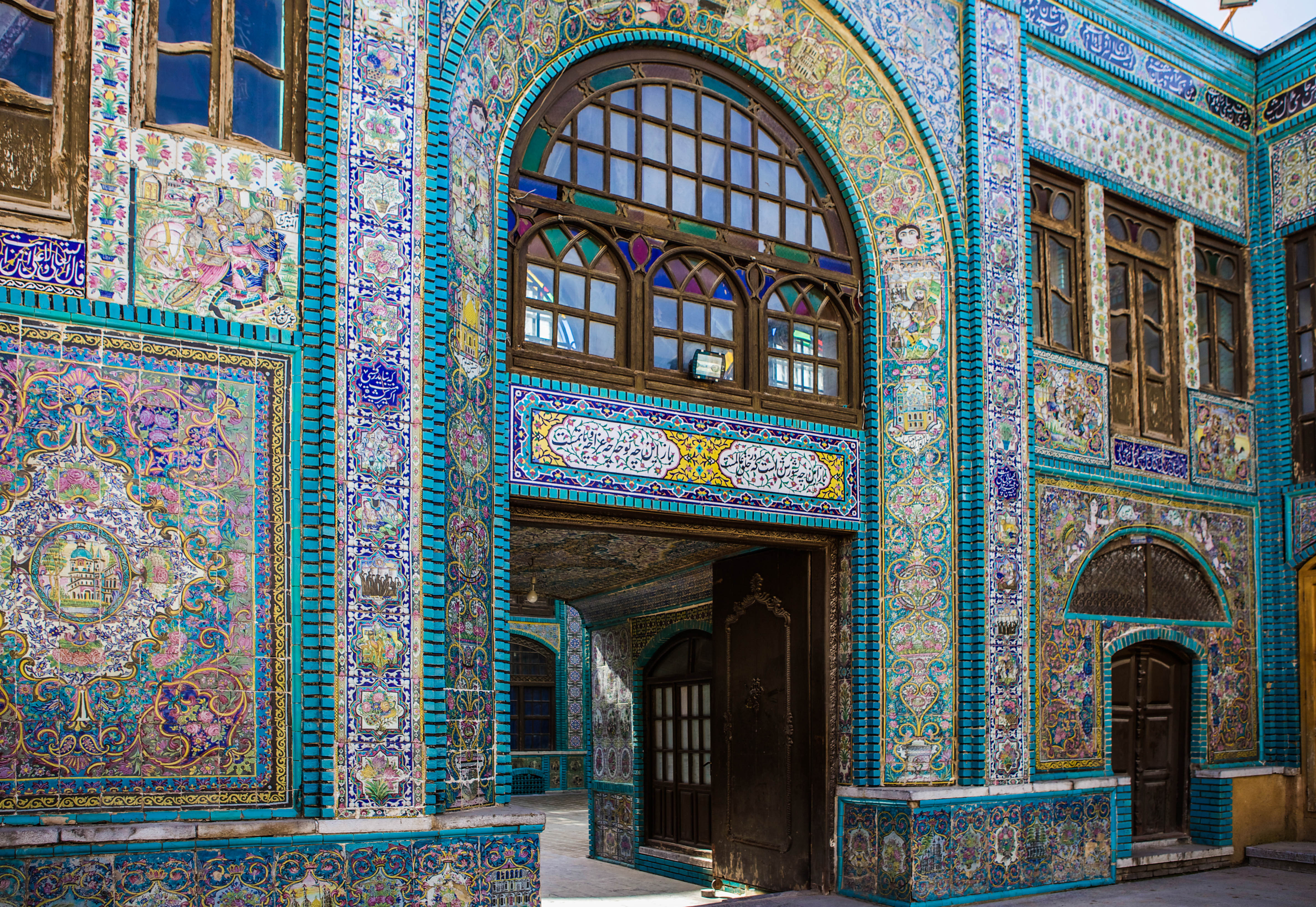 کاشیکاری‌های موجود در تکیه معاون‌الملک در کرمانشاه.